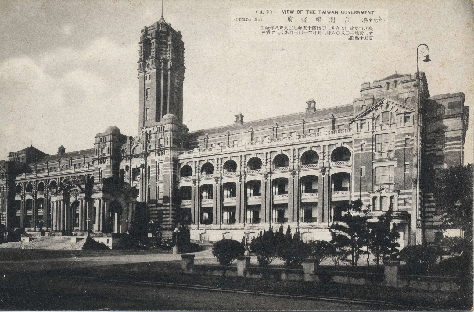 中文（台灣）: 臺灣總督府Bân-lâm-gú: Tâi-uân Tsóng-tok-hú. 臺灣總督府。